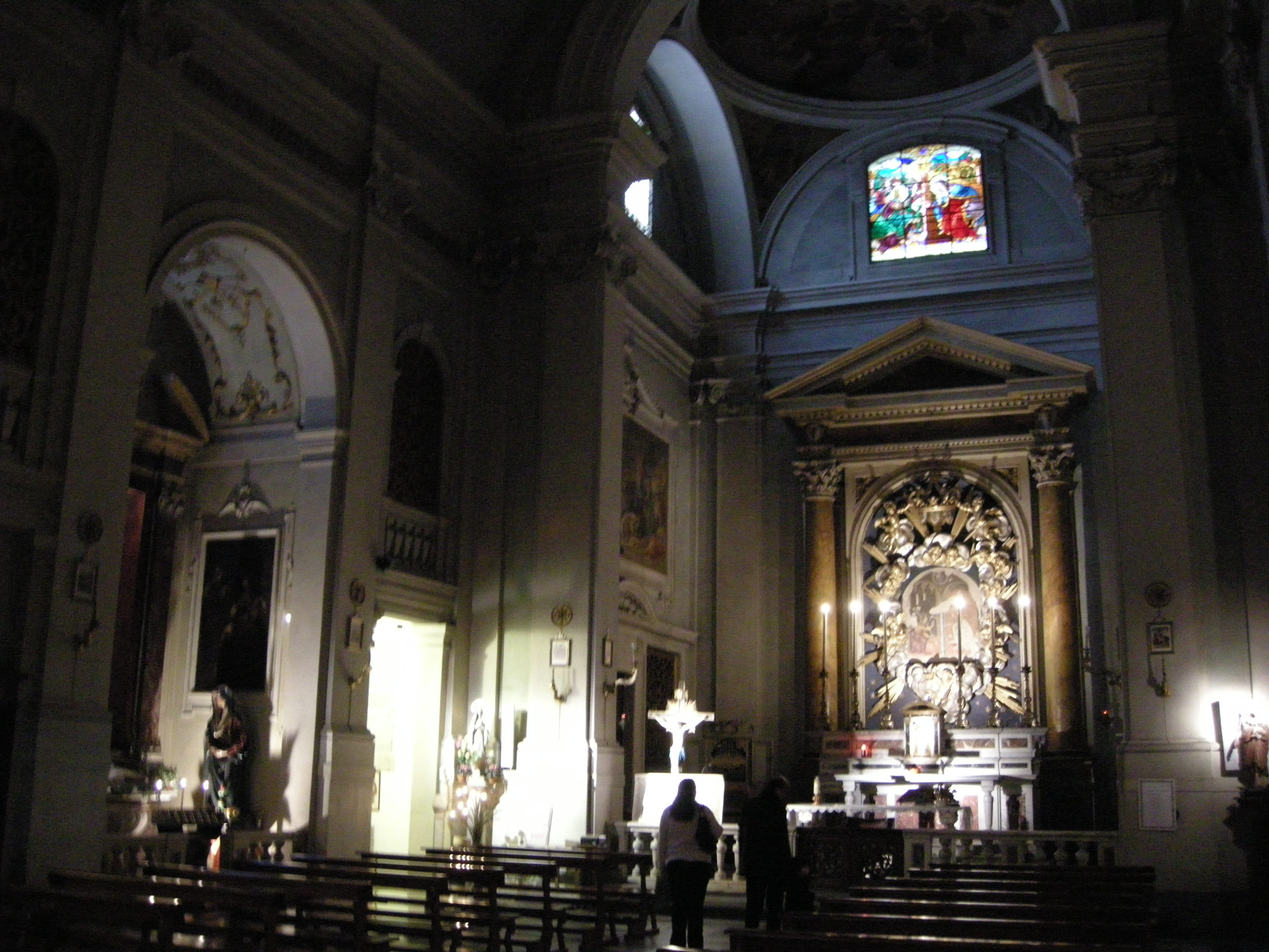 Interno di santa maria dei ricci